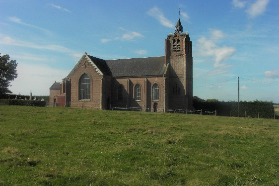 Église Saint-Martin de Frettemeule, Somme, France.